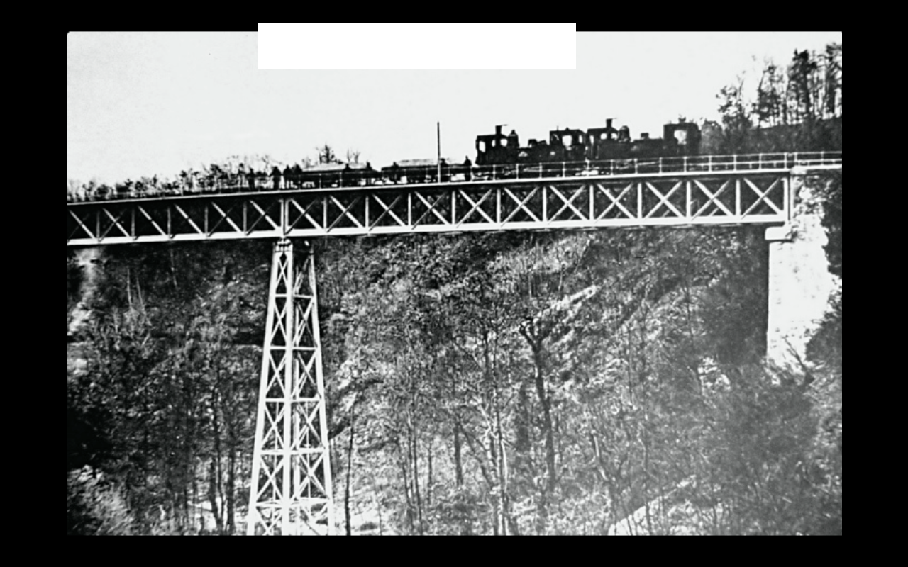 zoom viaduc